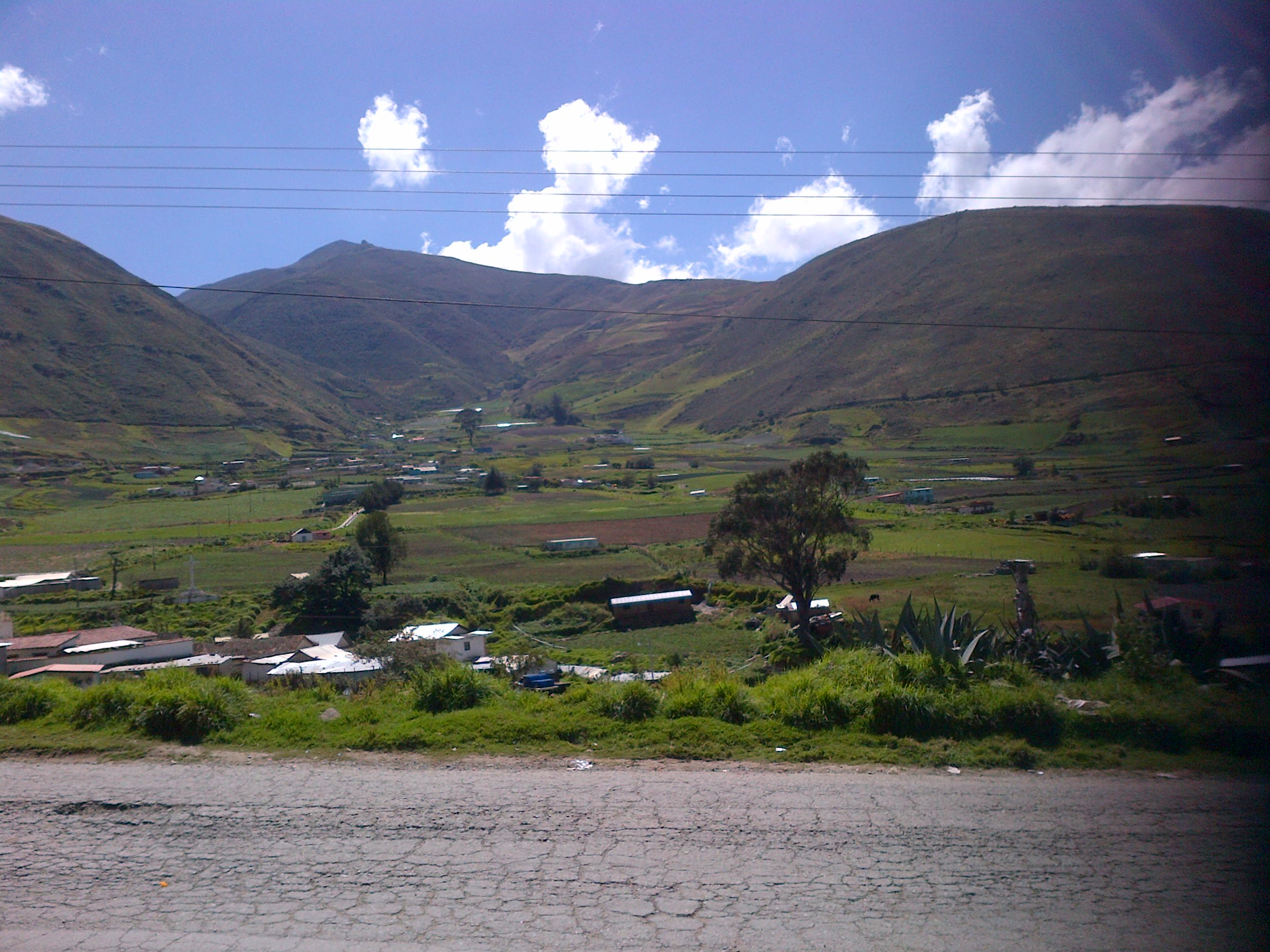 Tuñame, Municipio Boconó, estado Trujillo, Venezuela.